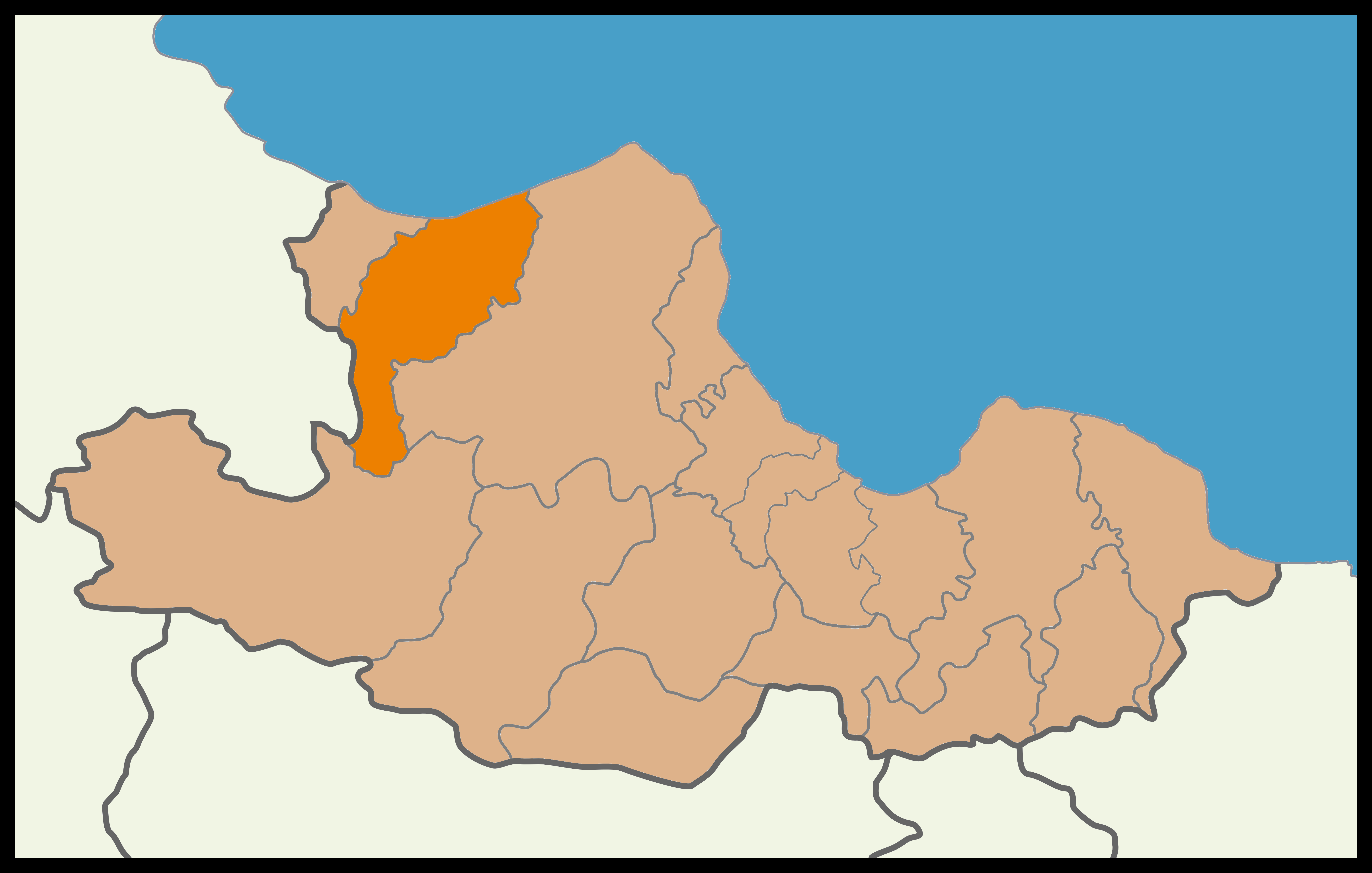 Samsun'un Alaçam ilçesinin 2014 Türkiye yerel seçimleri haritası.